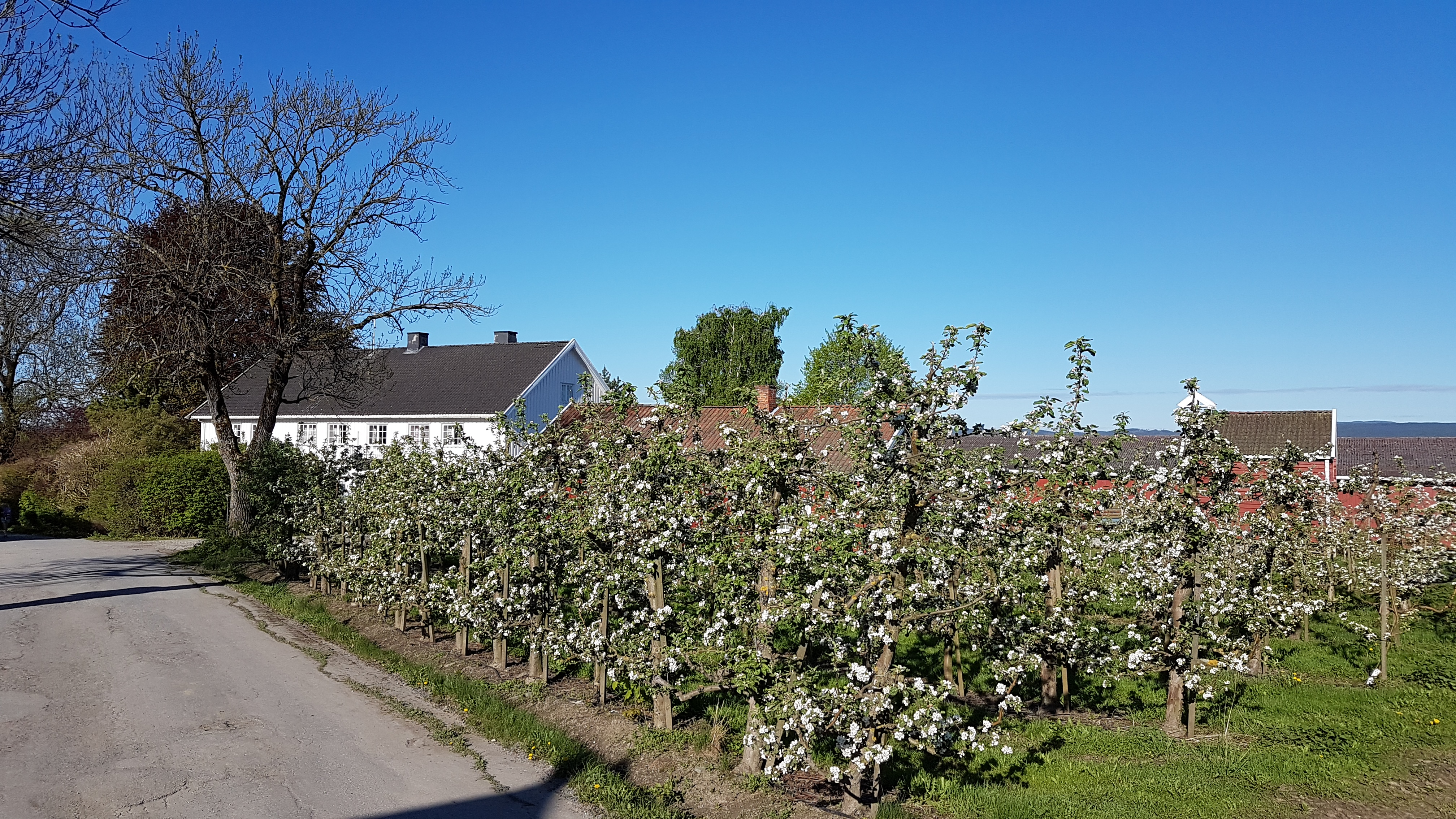 Ringvoll gård er Norges største frukthage og ligger på Norderhov i Ringerike kommune, Buskerud